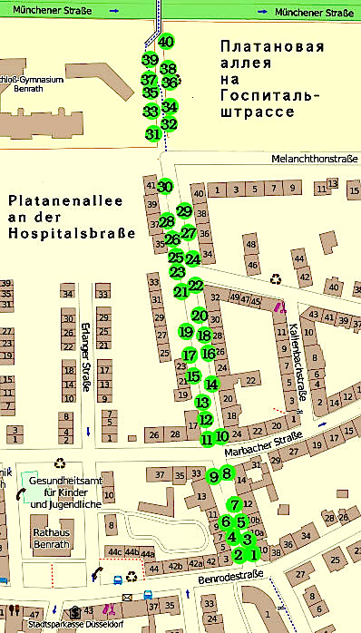 Платановая аллея на Госпиталь-штрассе, Бенрат. Охраняется законом.